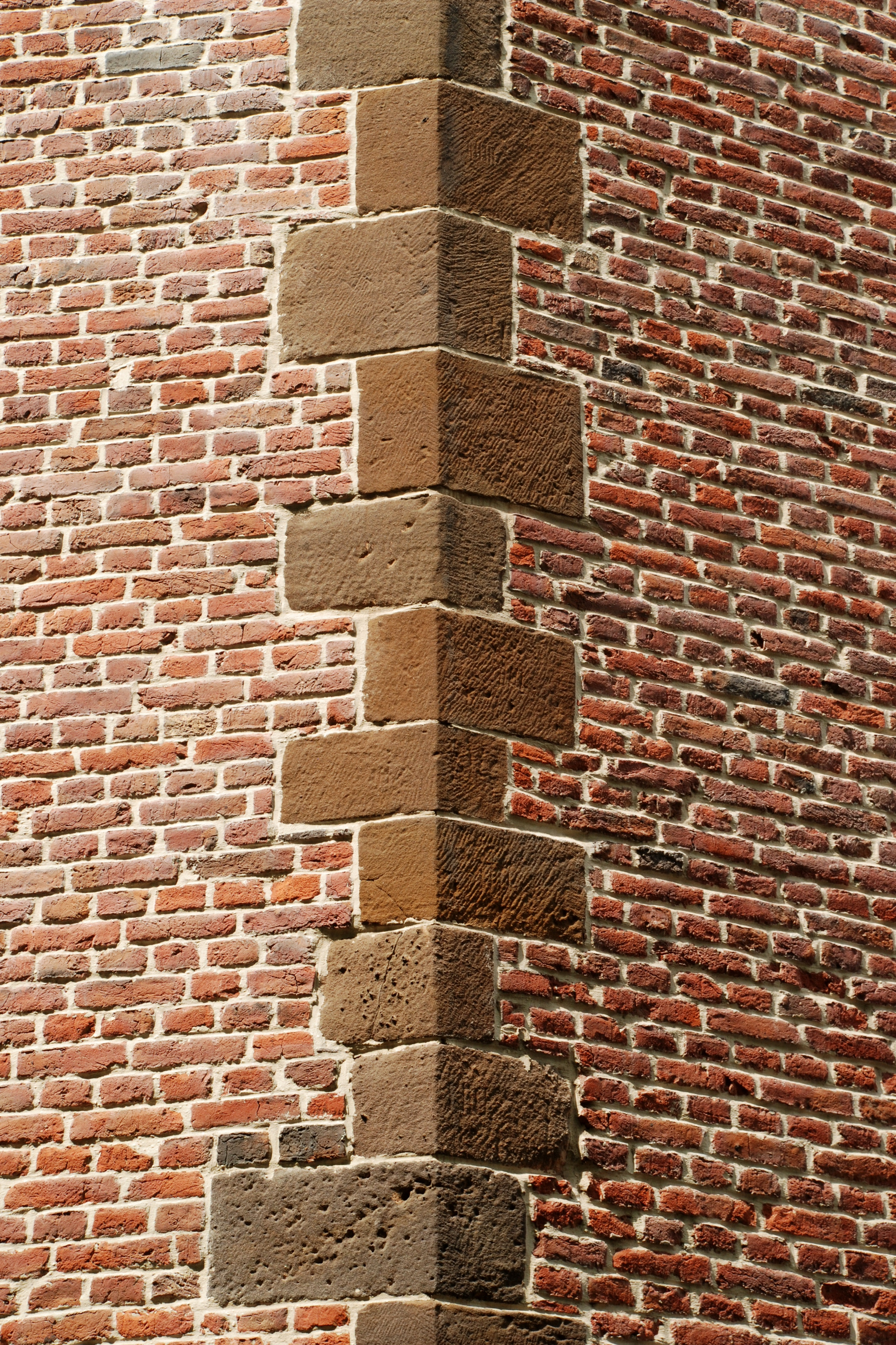 Belgique - Brabant wallon - Ottignies - Église Saint-Rémi